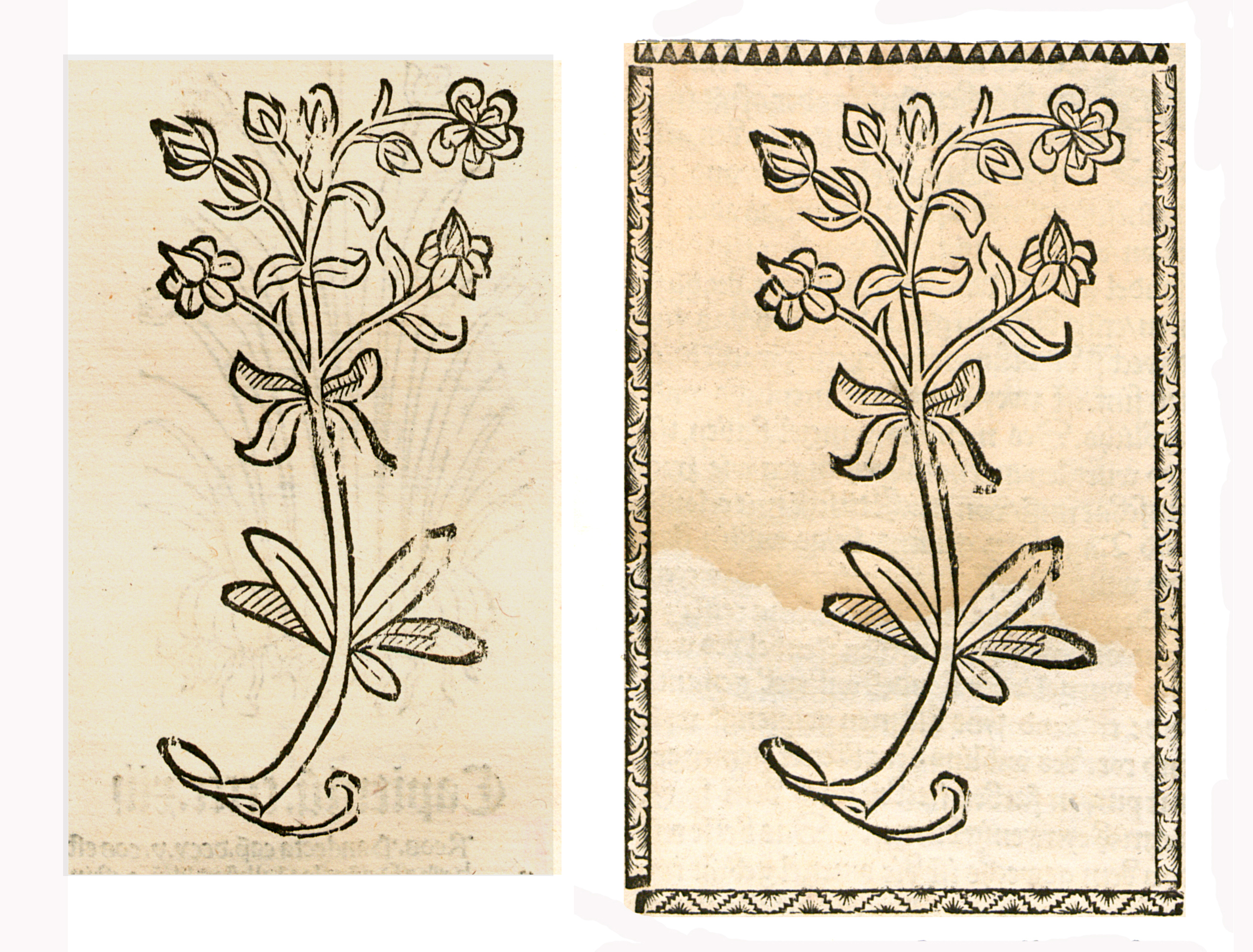 Abbildung vonː Sant Johans Krut (Hypericum perforatum)